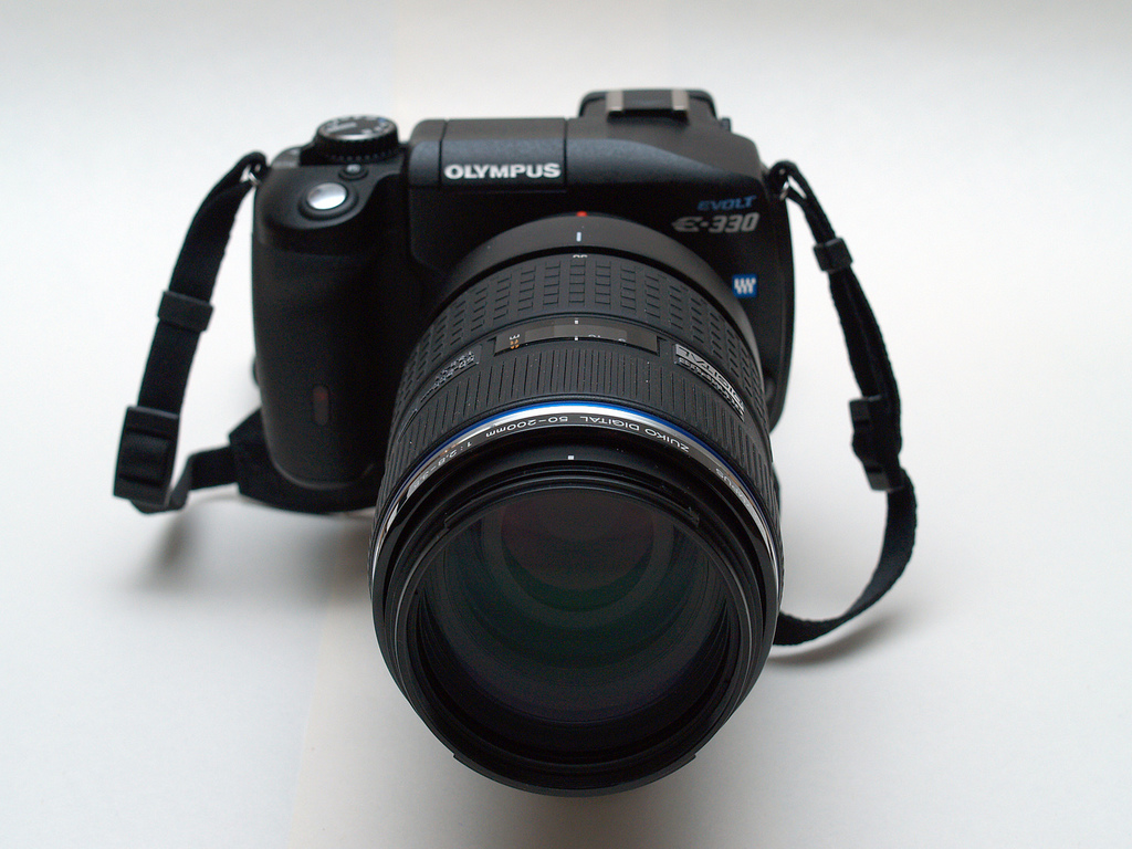 Olympus E-330 & Zuiko Digital ED 50-200mm 2.8-3.5 SWD